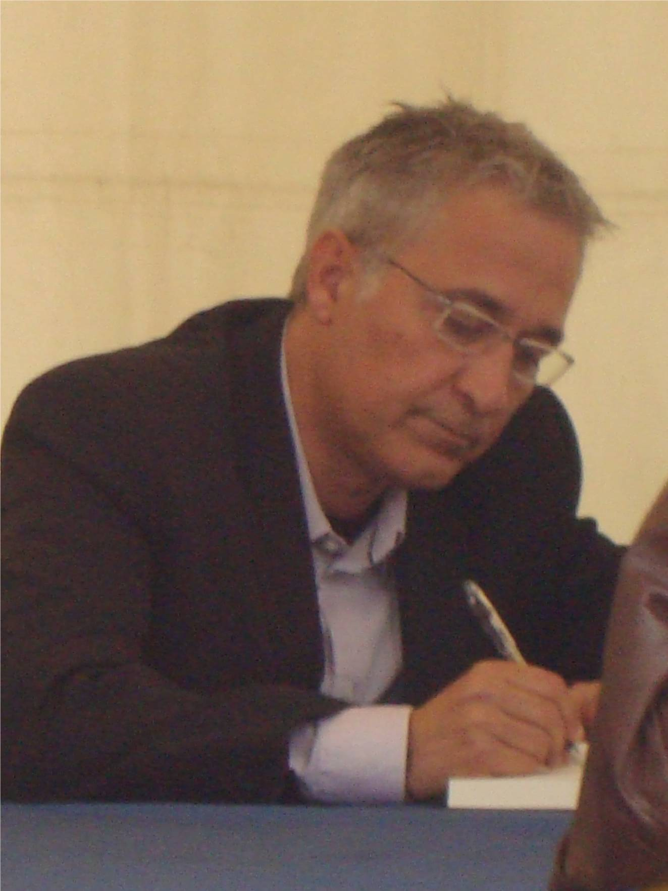 Xavier Sardà signant llibres per Sant Jordi.